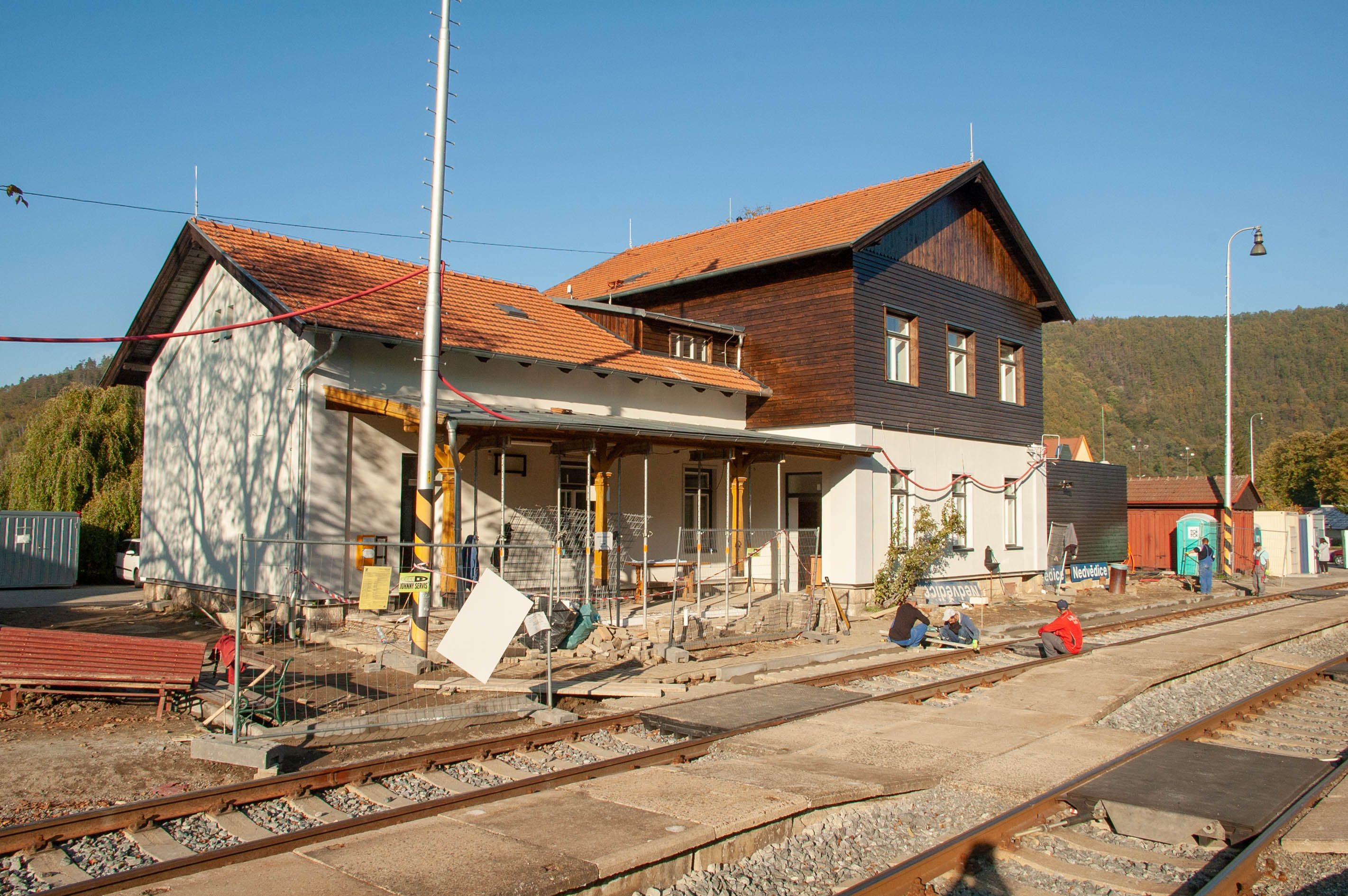 Železniční stanice Nedvědice